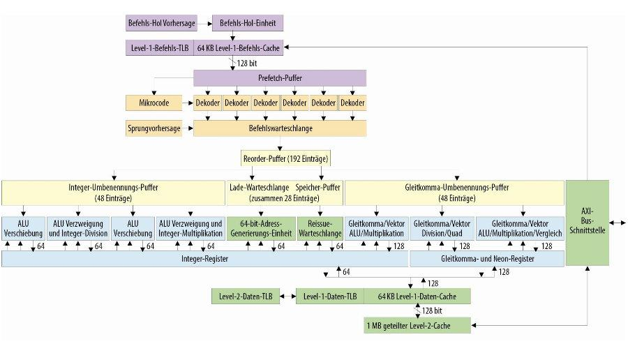 Blockschaltbild der von Apple entwickleten 64-bit-Cyclone-CPU, die im Apple-A7-SoC in einer Dual-Core-Variante zum Einsatz kommt.